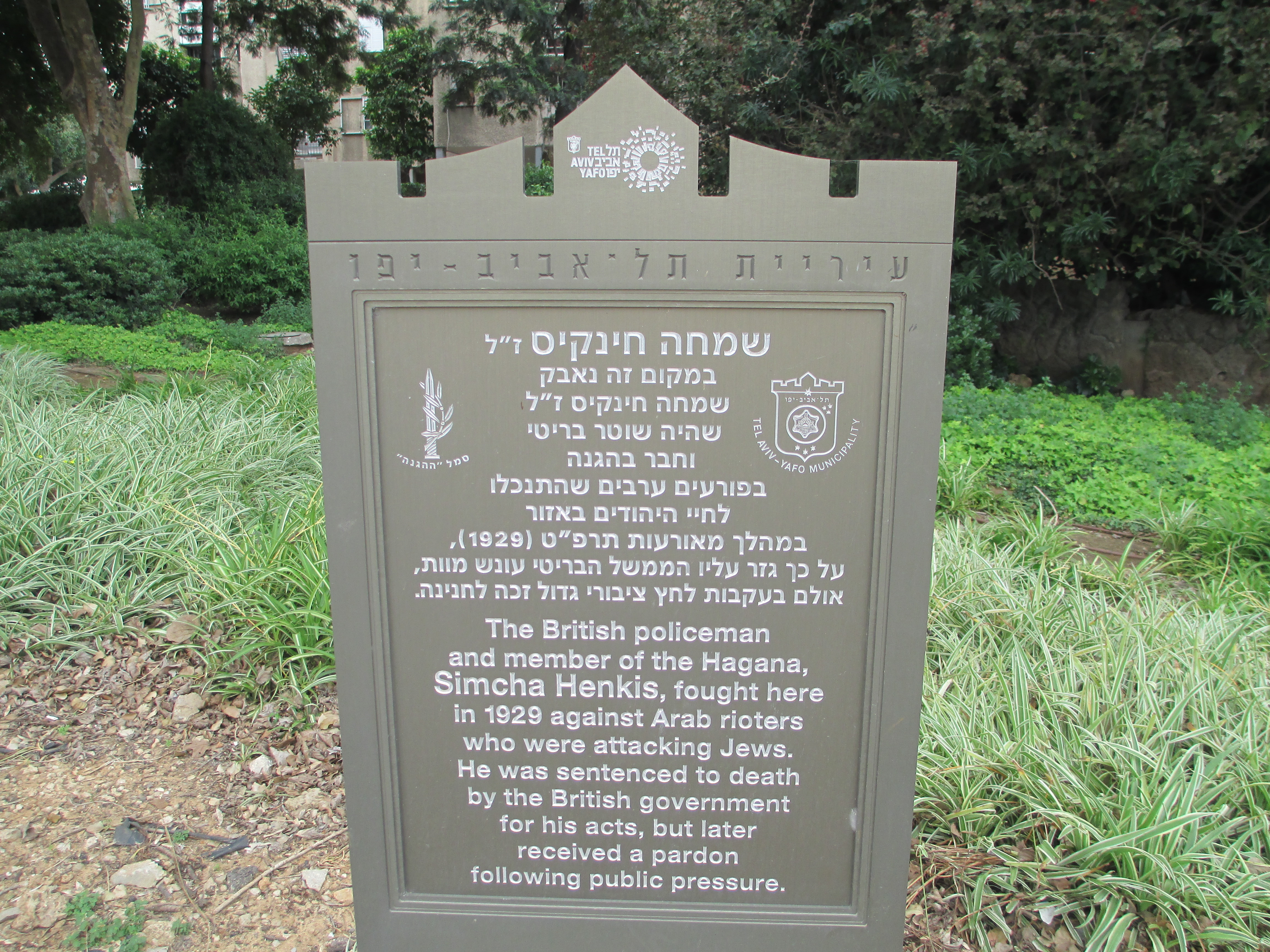 שלט זיכרון לשוטר שמחה חינקיס ברח' דרך בן צבי פינת גרינבוים בתל אביב